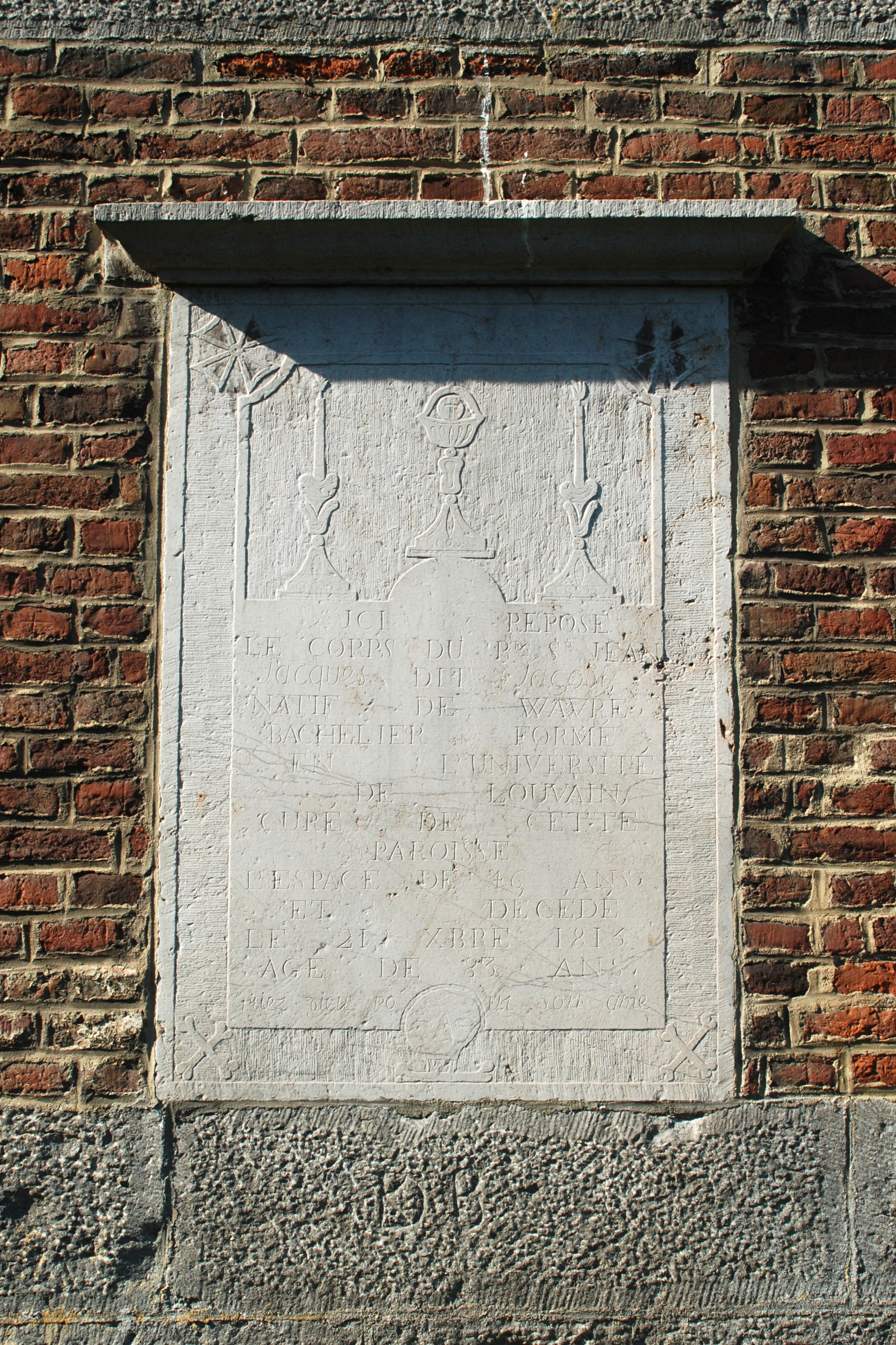 Belgique - Brabant wallon - Genappe - Baisy-Thy - Église Saint-Hubert